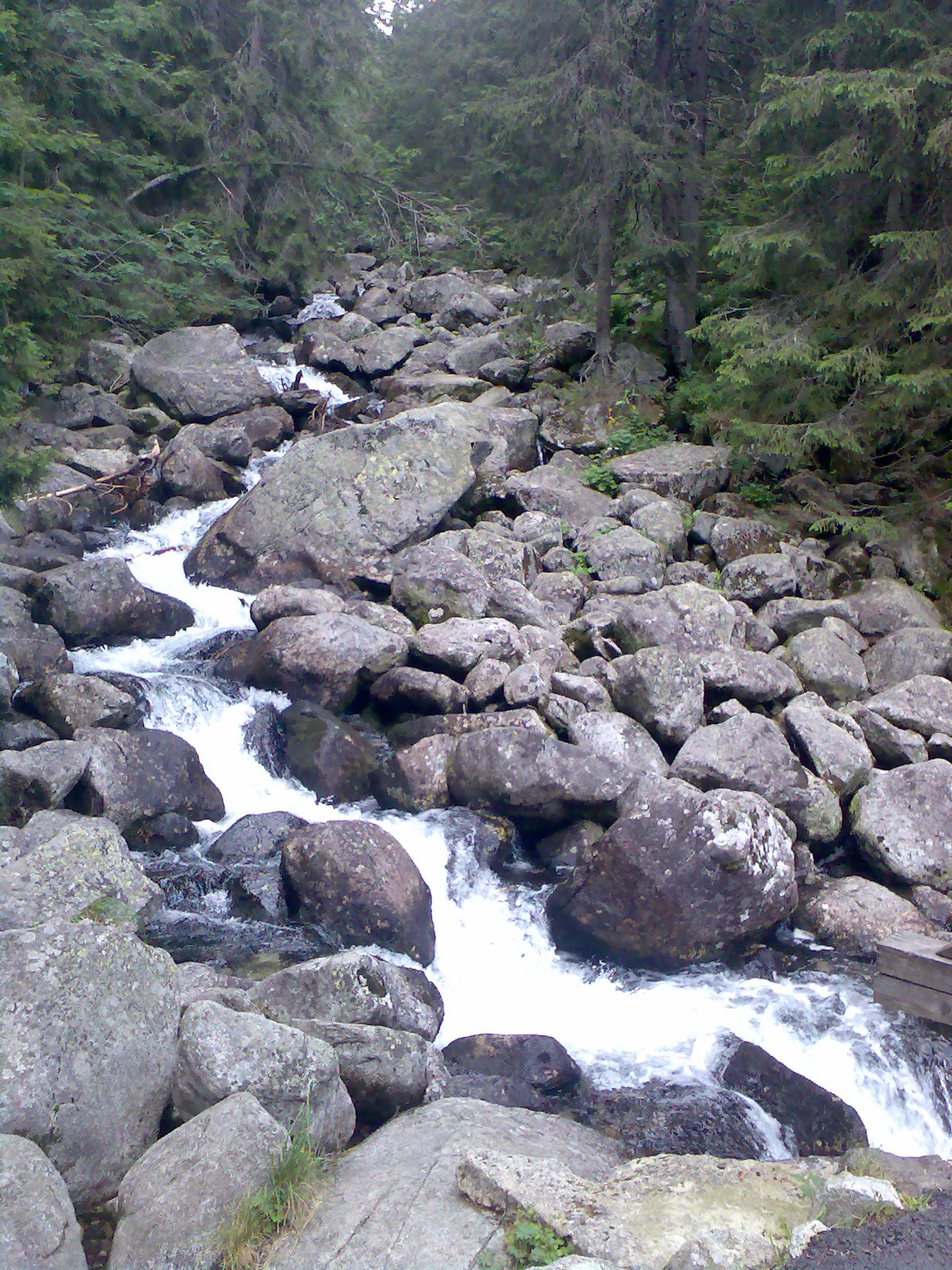 potok Krupá